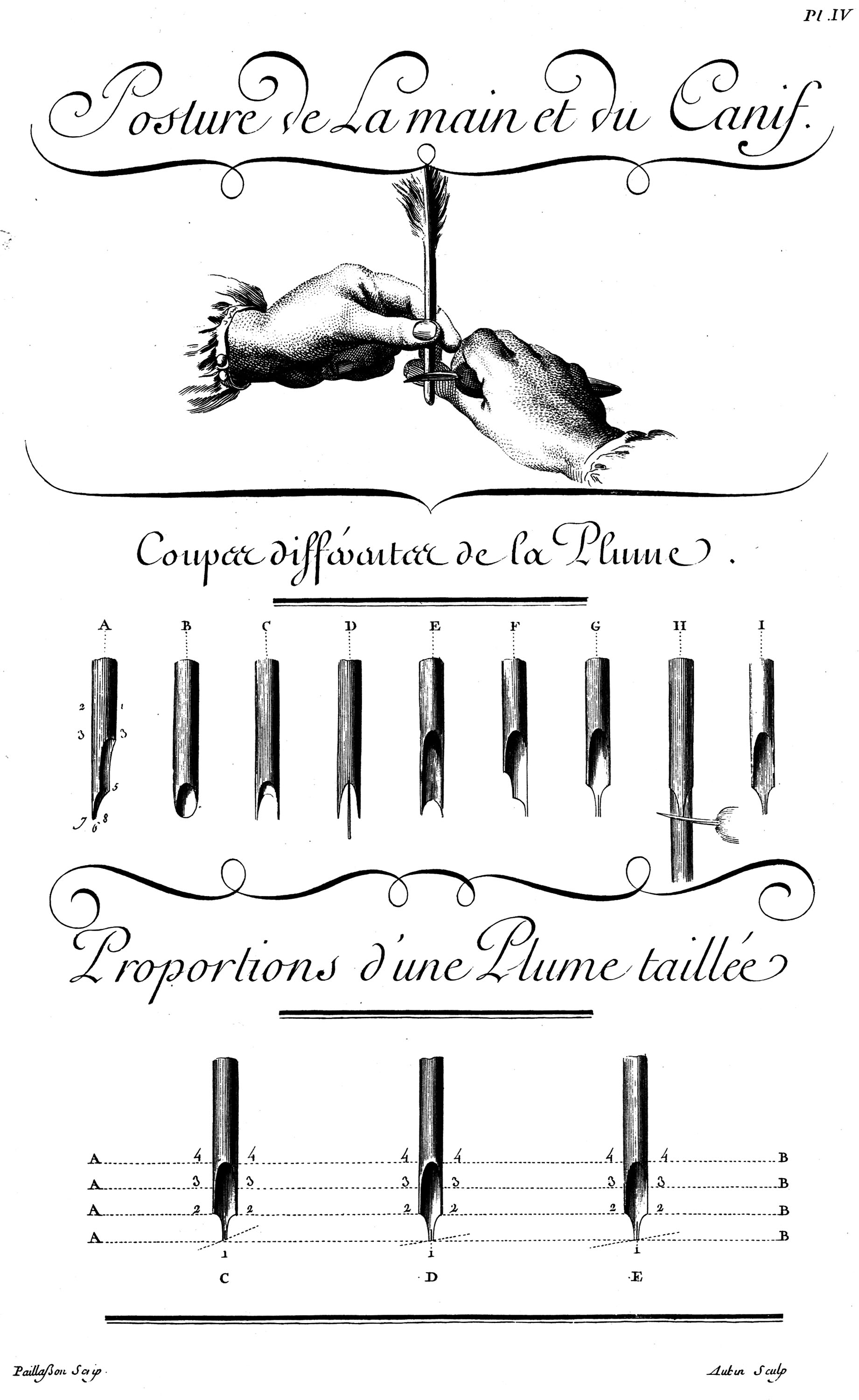 Planche de l’Encyclopédie de Diderot et d’Alembert : taille de la plume pour l’écriture, par Charles Paillasson.